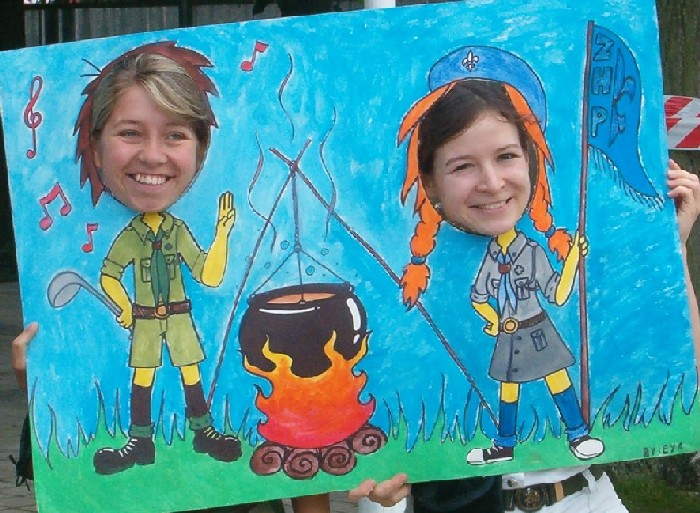 Fotka